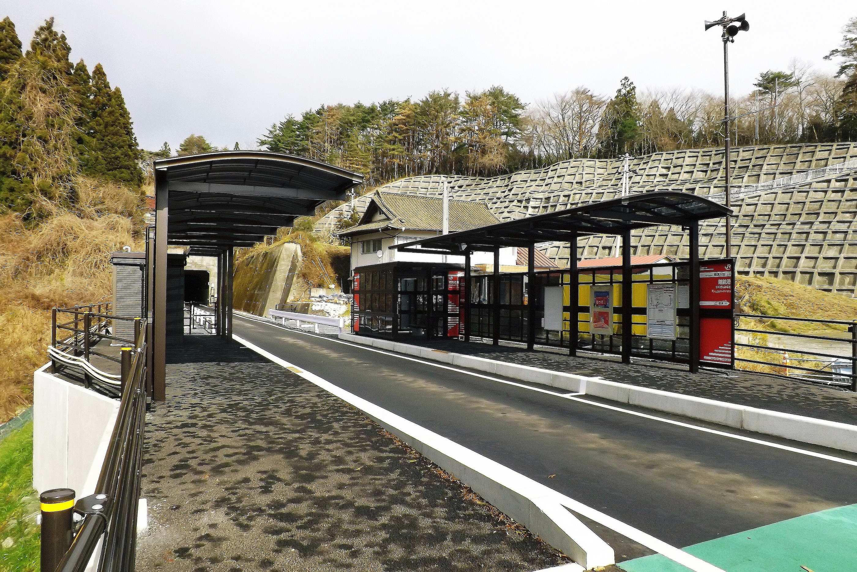 BRTホーム(左が下り用)。下りホームにトイレ(水洗・温水洗浄便座付)、上りホームに待合室と運行情報モニターがある。